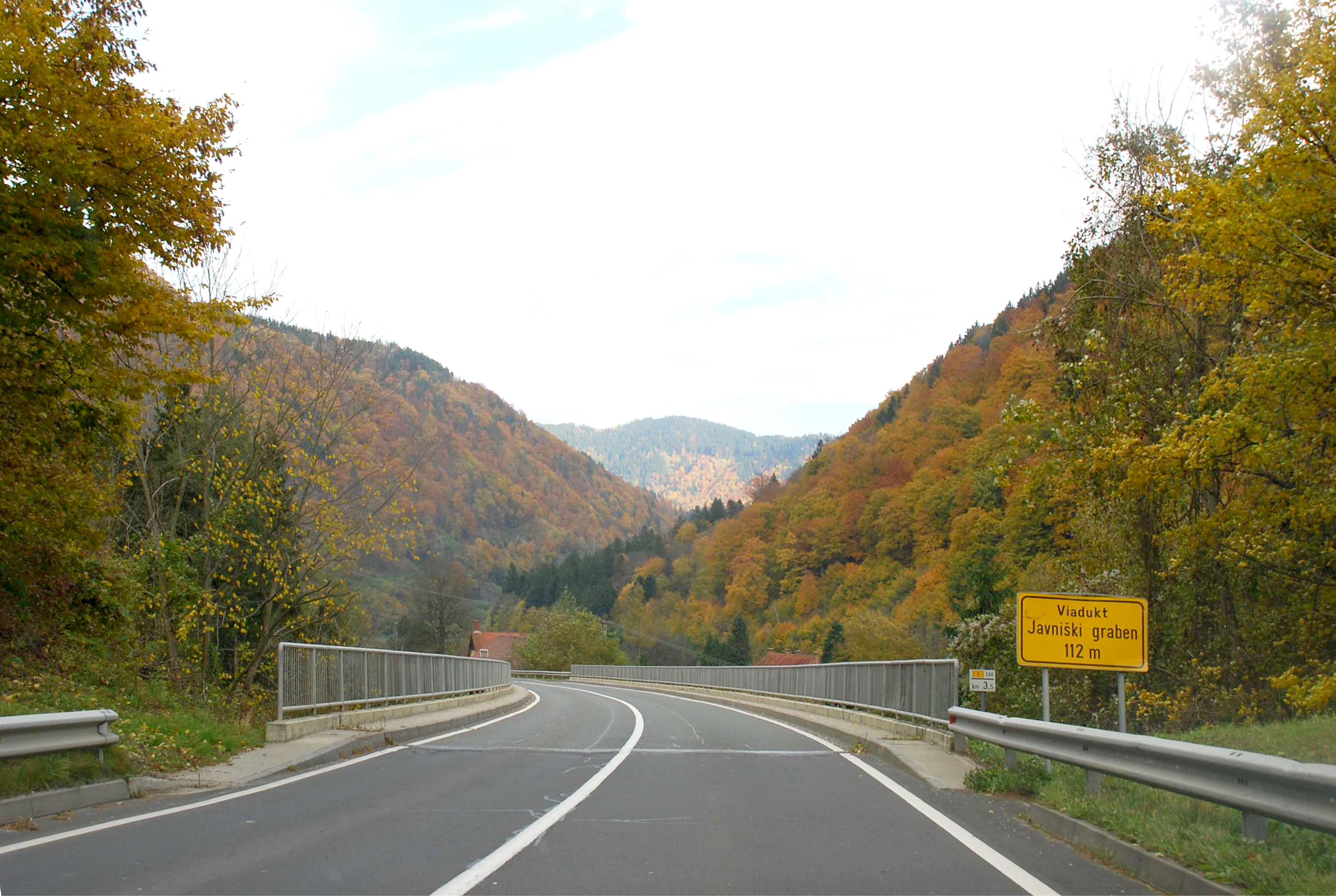 Drautal in Slowenien zwischen Brezno und Ožbalt im Gebiet von Javnik (ehemalige Gemeinde Jaunegg): Straßenbrücke der Mariborska cesta/Marburger Straße über den Javniški graben (sic! Graben als Fremdwort im Namen, auch die Landkarten verwenden die Abkürung „gr“).